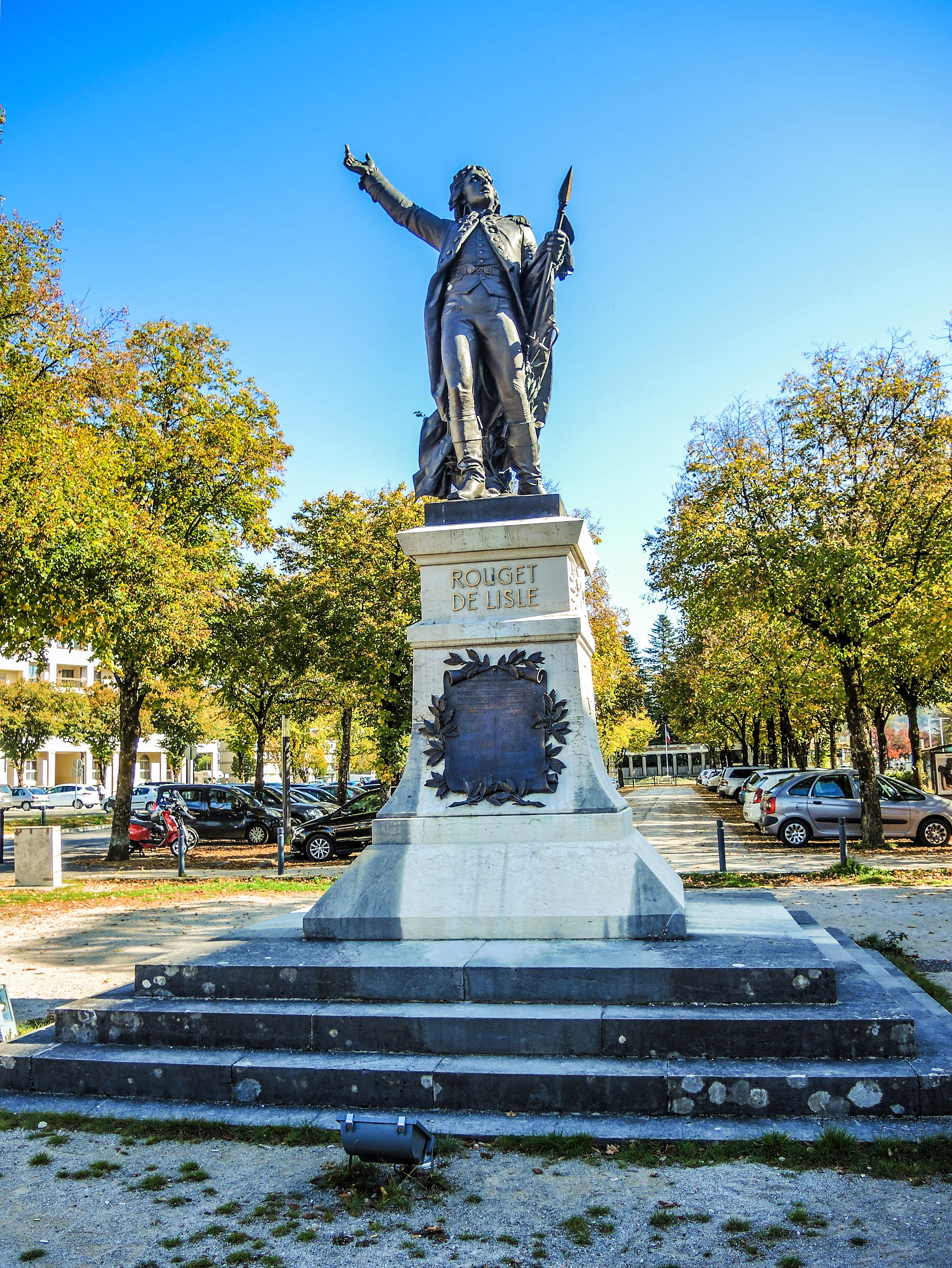 Statue de Rouget-de-Lisle. Lons-le-Saunier. Jura.